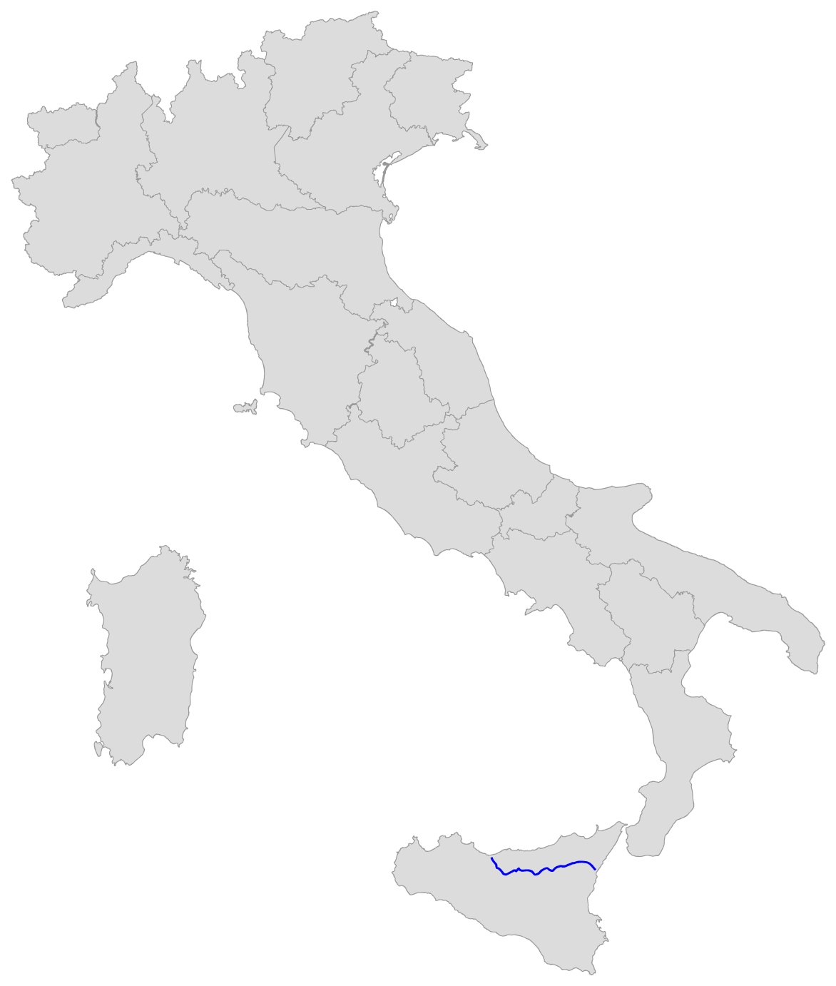 Percorso della SS 120 dell'Etna e delle Madonie